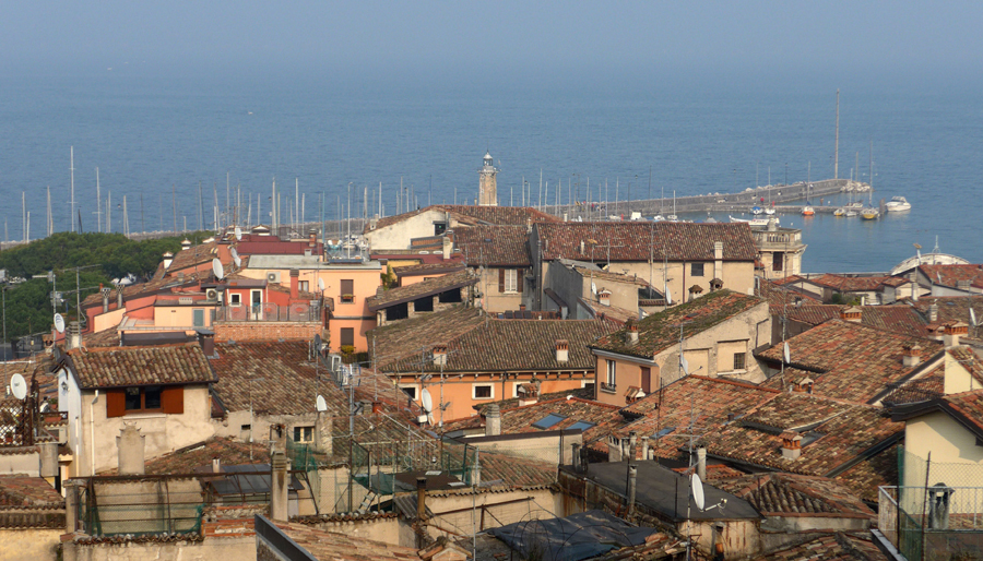 Desenzano del Garda, panorama dal castello.